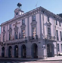 Ayuntamiento del concejo asturiano de Allande.